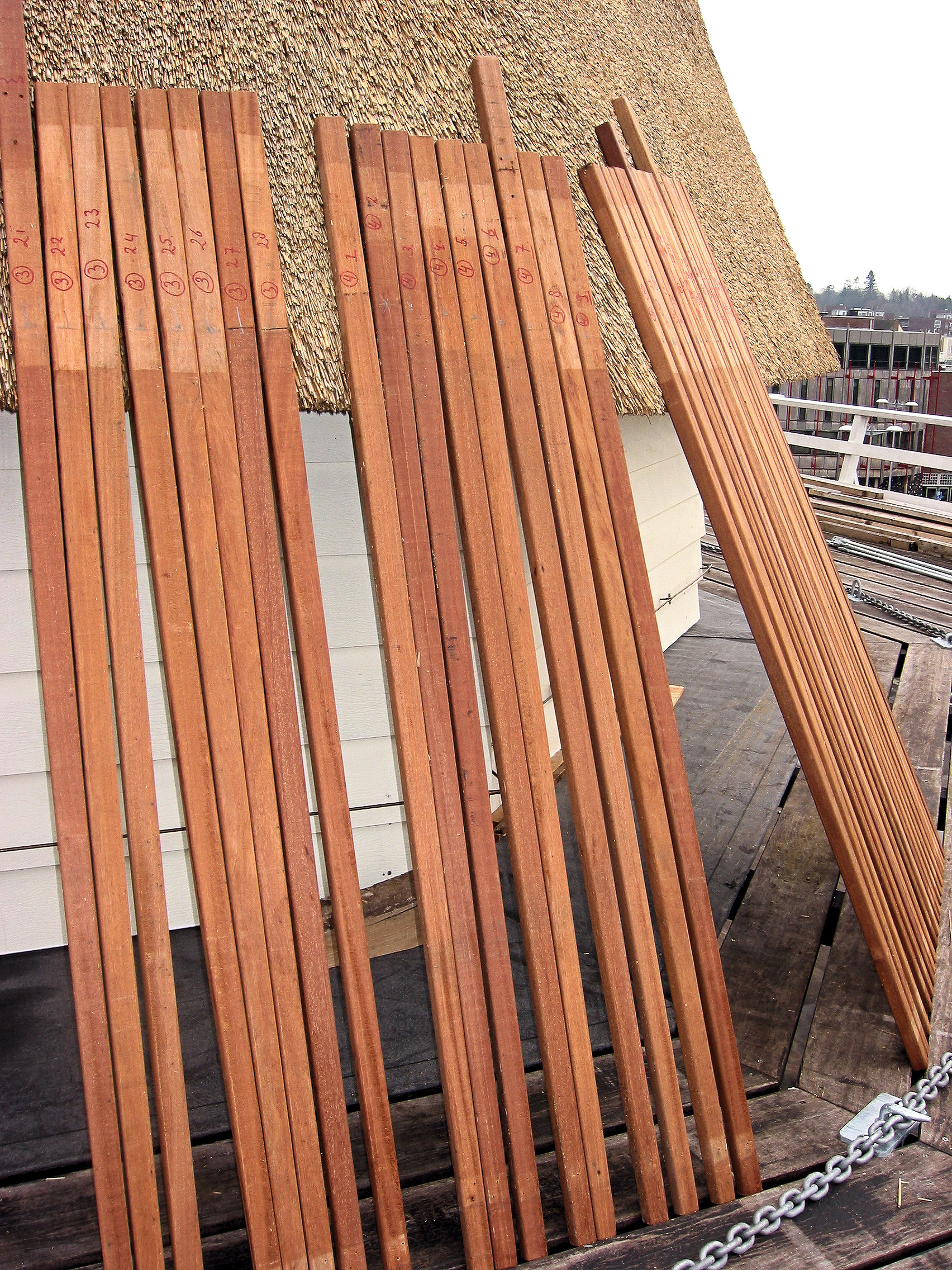 Angelim vermelho heklatten van de Concordia molen te Ede